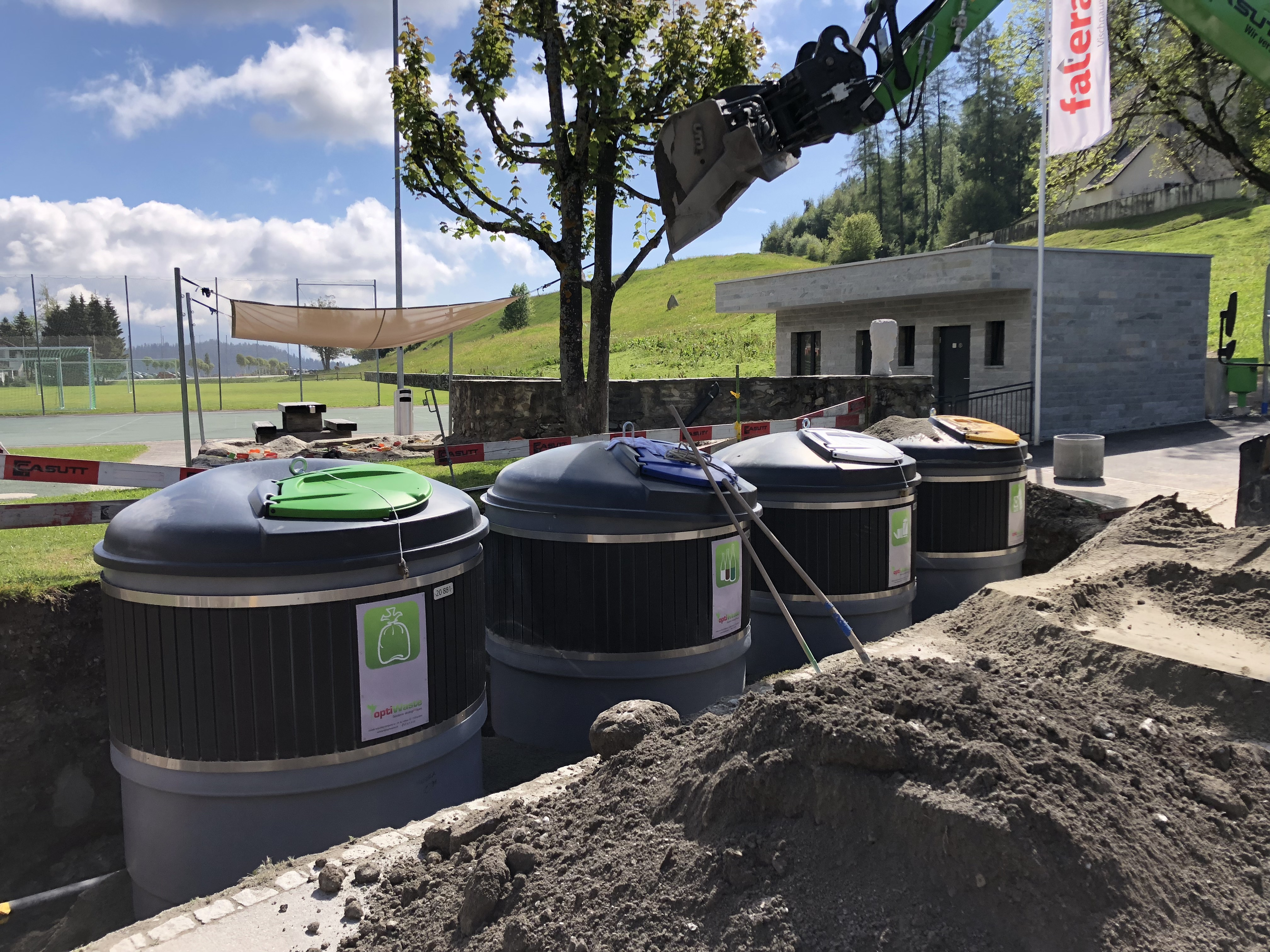 Einbau von Halbunterflurcontainern MOLOK in der Schweiz